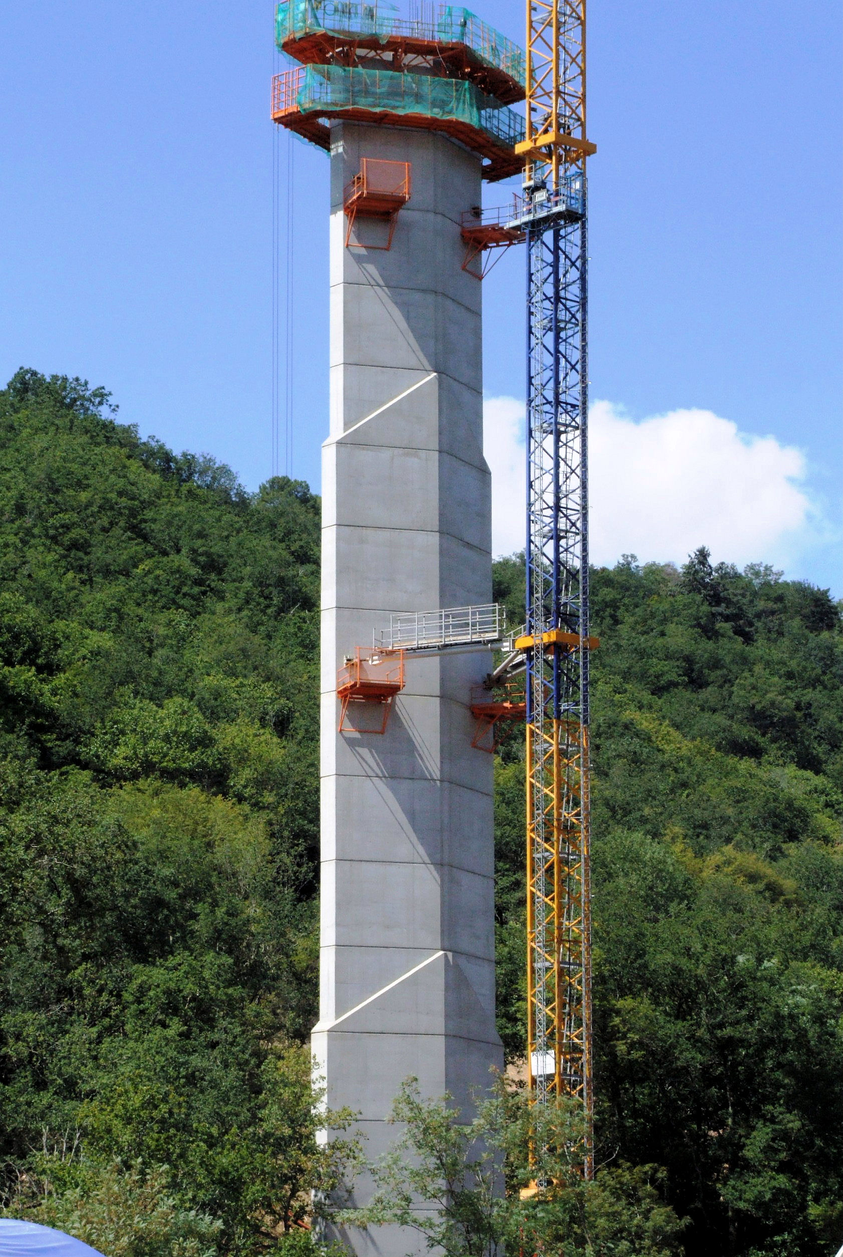 A89 - Viaduc de l'Elle - Réalisation du fût de la pile P3